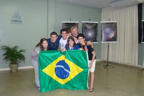 Foto da Equipe Brasileira na I Olimpíada Latino-Americana de Astronomia e Astronáutica.